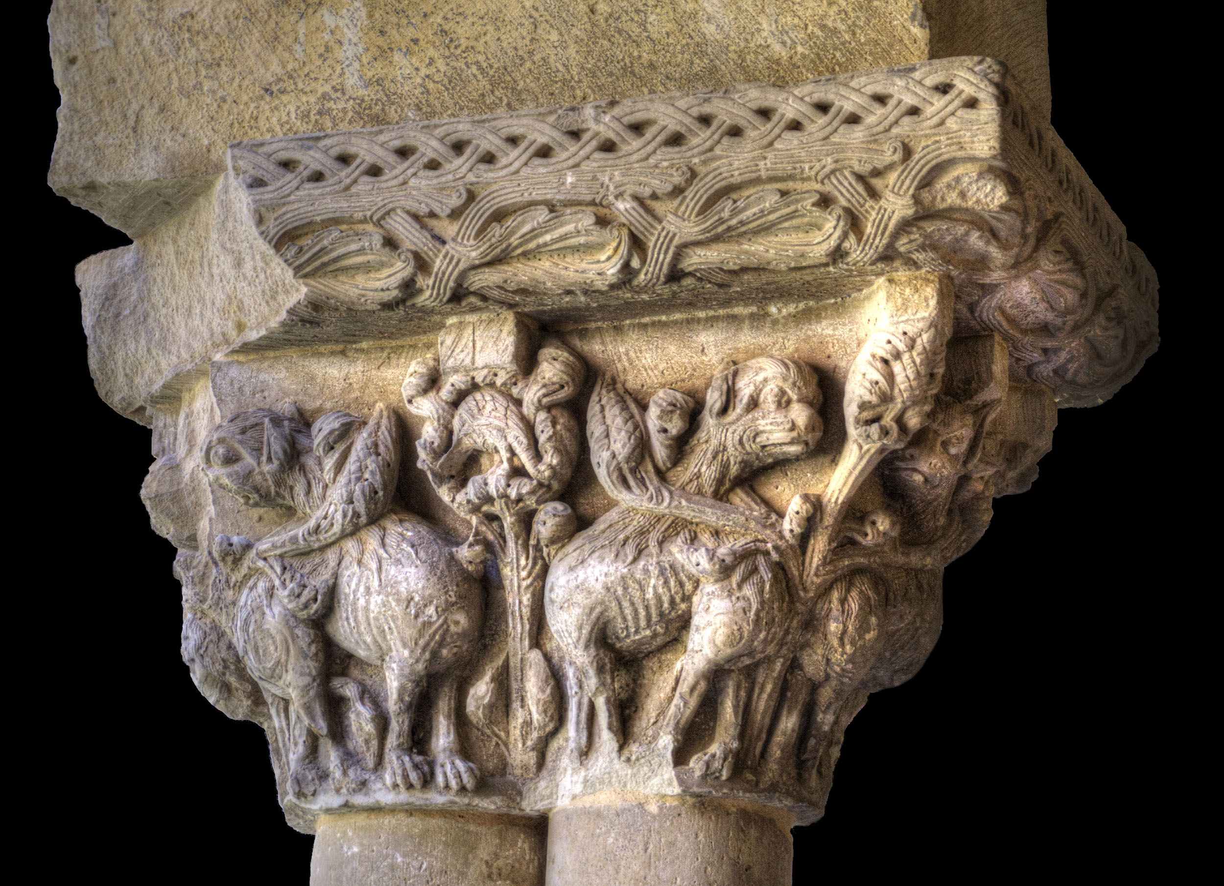 Capiteles del claustro bajo.